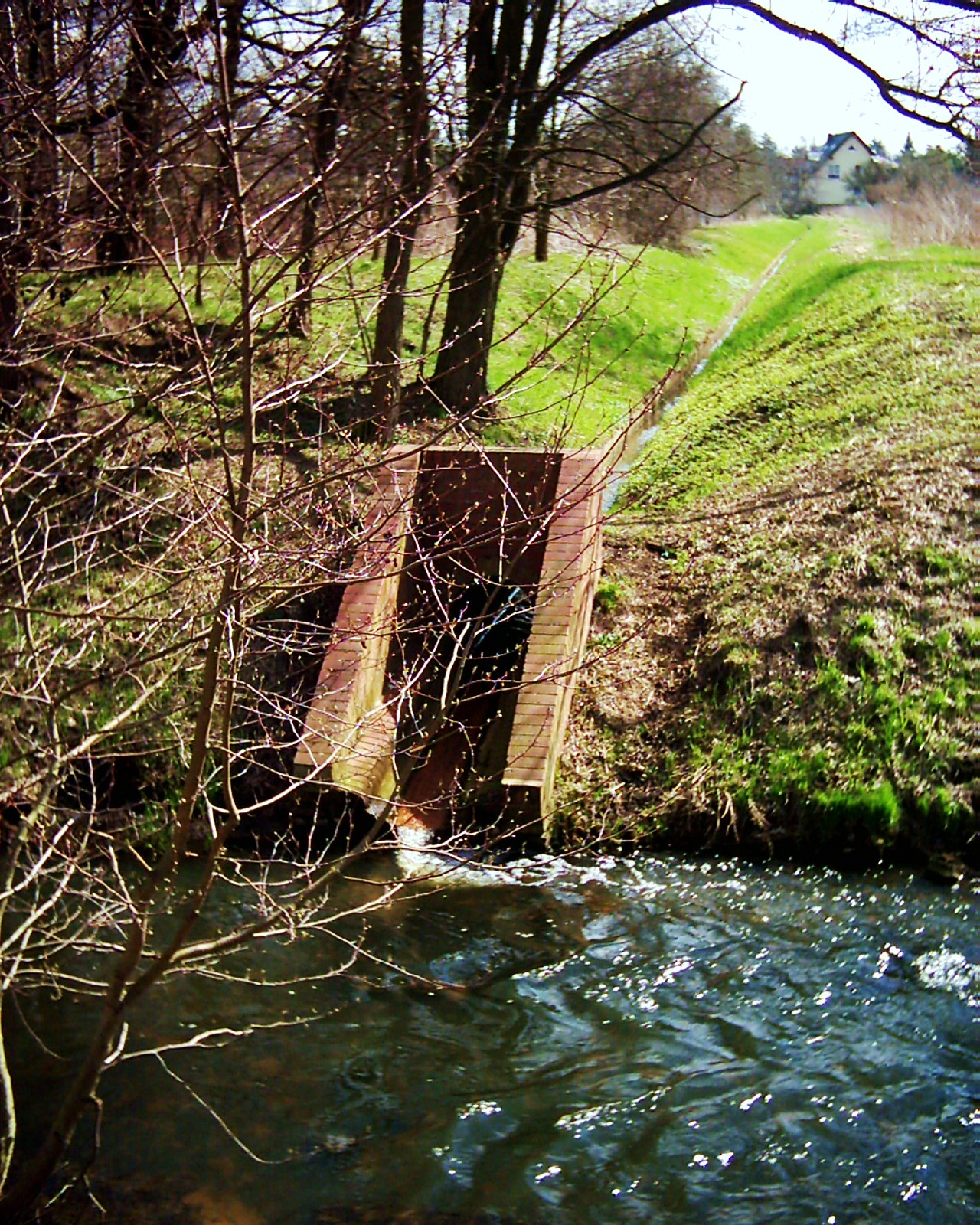 Die Panke hatte vormals auch Nebenflüsse. Der Rübländer Graben aus dem Gebiet östlich der Panke, heute den Kleingartenanlagen bis hin zur Bucher Chaussee. Einst war es ein Ableiter der Rieselwässer leitete sein Wasser in die Panke. Heute entwässert er zwar immer noch aber bei geringerer Wasserführung. Ein möglicher natürlicher Lauf lässt sich aus dem jetzigen Zustand nicht mehr herleiten.